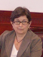 27 de Enero de 2010